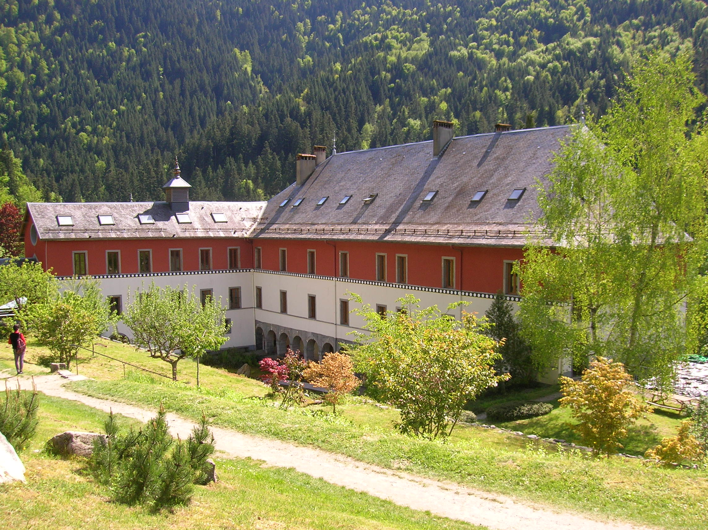 Première journée de "HARMONIE DES STEPPES", Festival culturel mongol de l'Institut Karma Ling. Chartreuse de Saint Hugon, Hameau de Saint Hugon, Arvillard, Isère, AuRA, France.